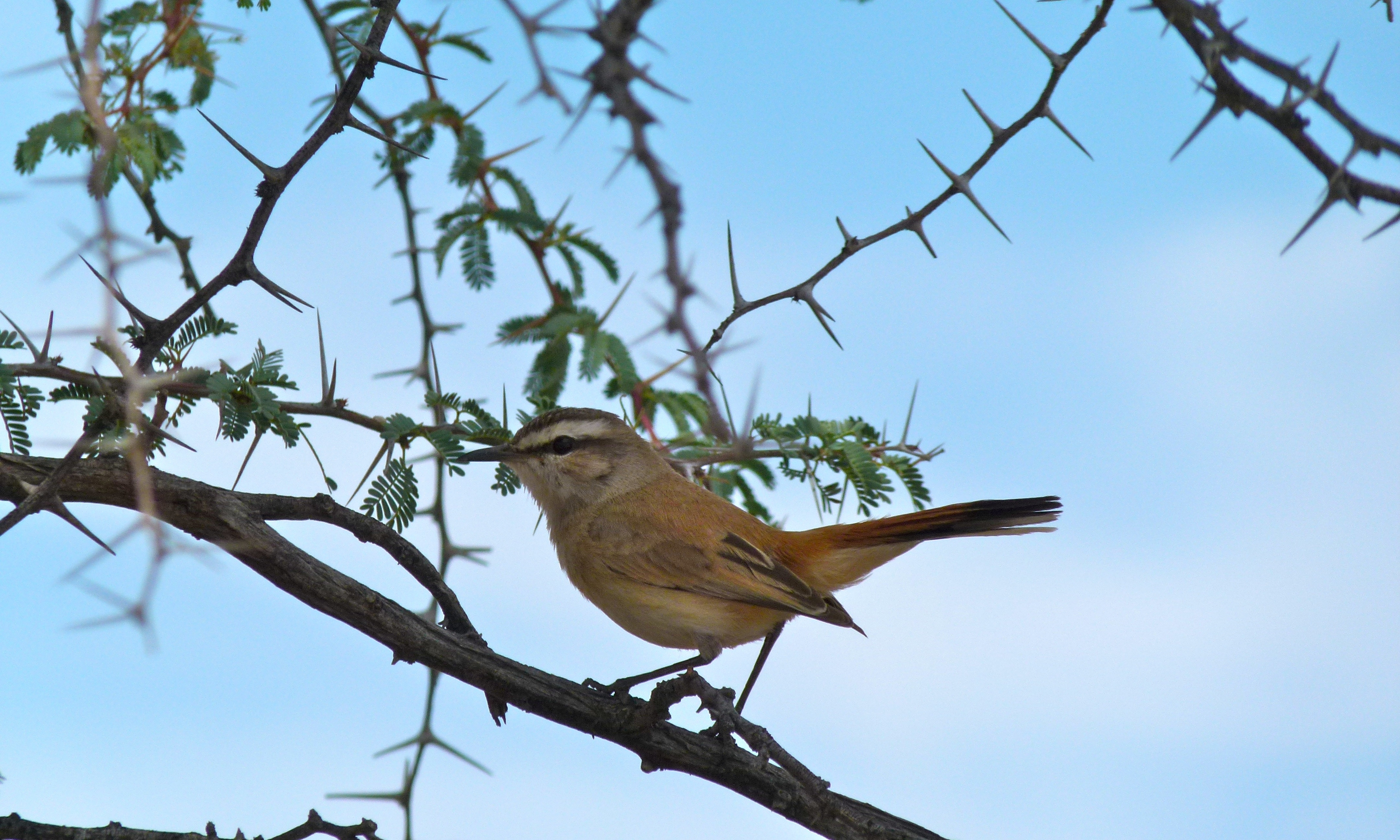 Nossob Riverbed, Kgalagadi Transfrontier Park, SOUTH AFRICA